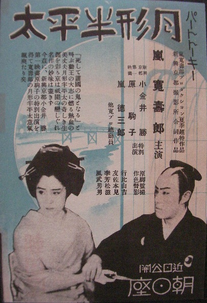 『月形半平太』、1935年公開時のフライヤー